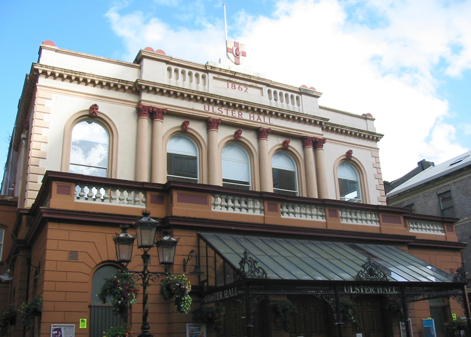 Ulster Hall, Belfast